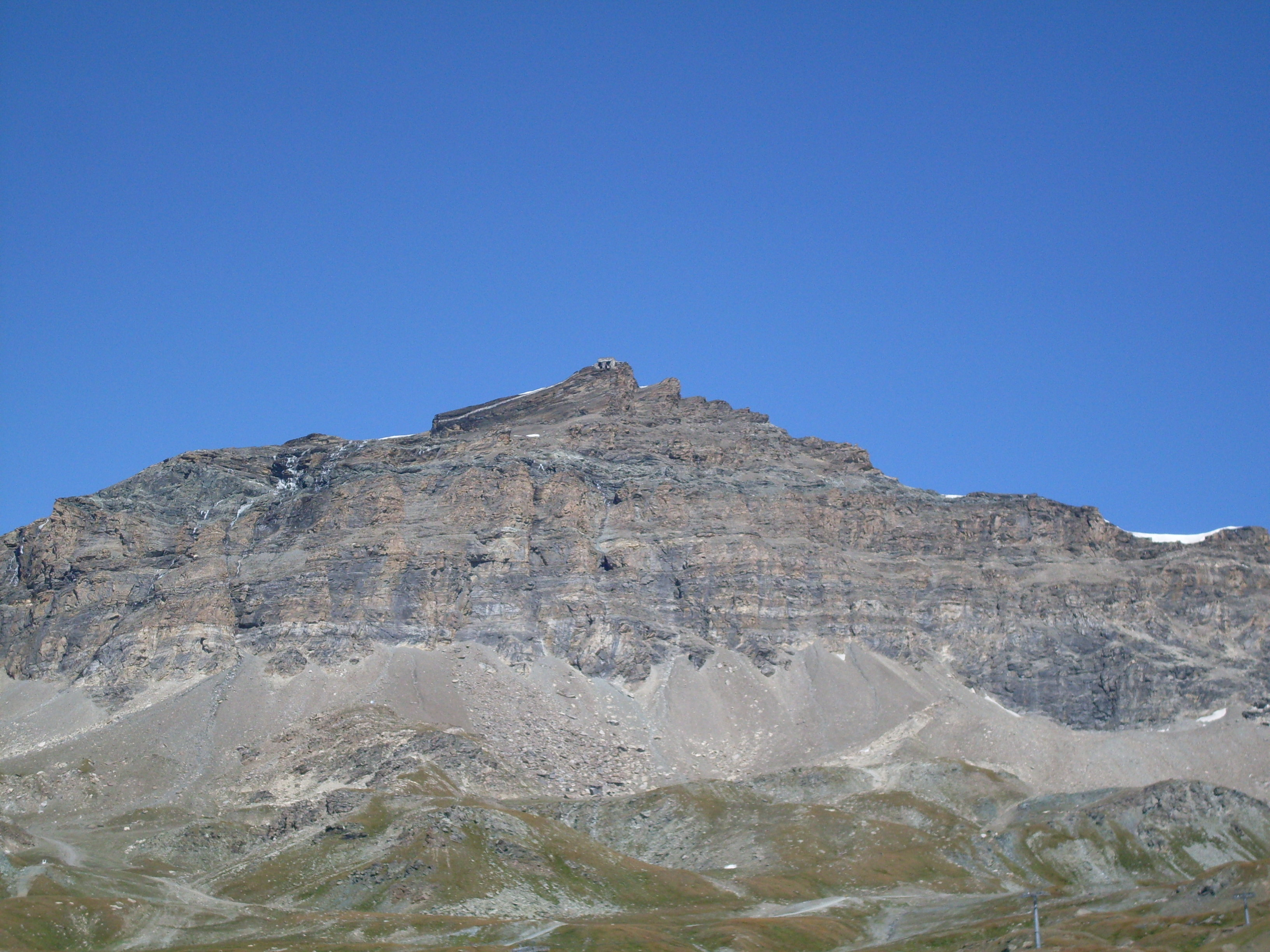 Monte Furggen